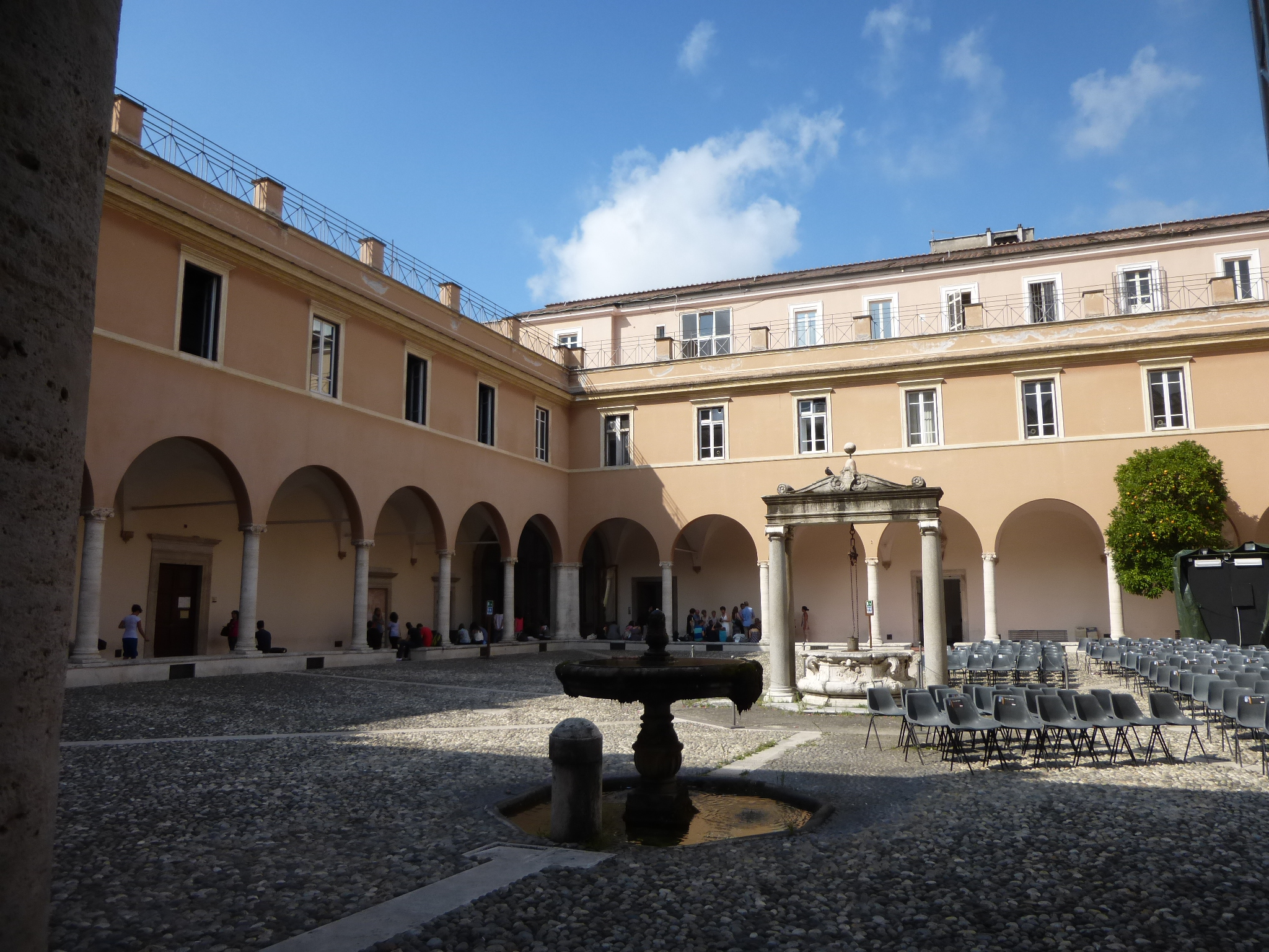 Roma, chiostro di San Pietro in Vincoli, oggi cortile della Facoltà di Ingegneria della Sapienza.